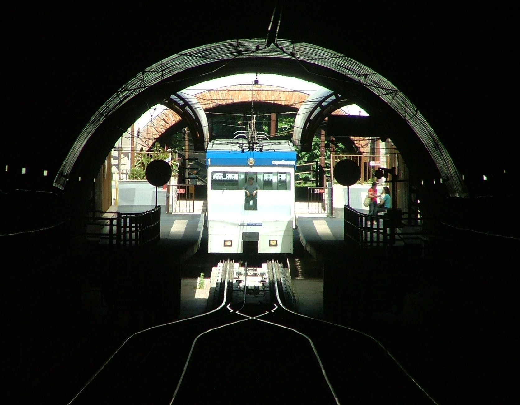 Funikular Montesanto (Neapol, Napoli).